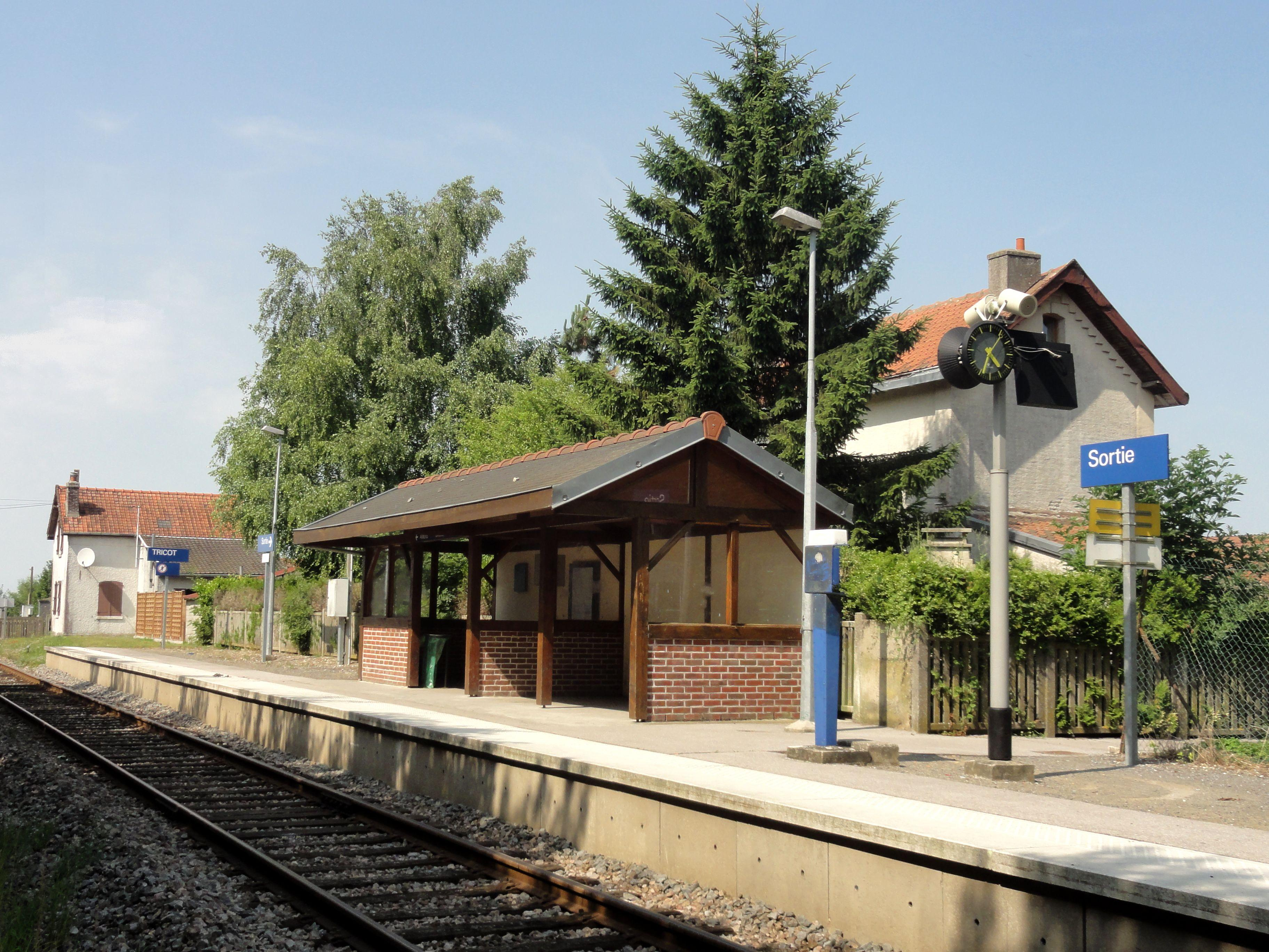 Arrêt SNCF.